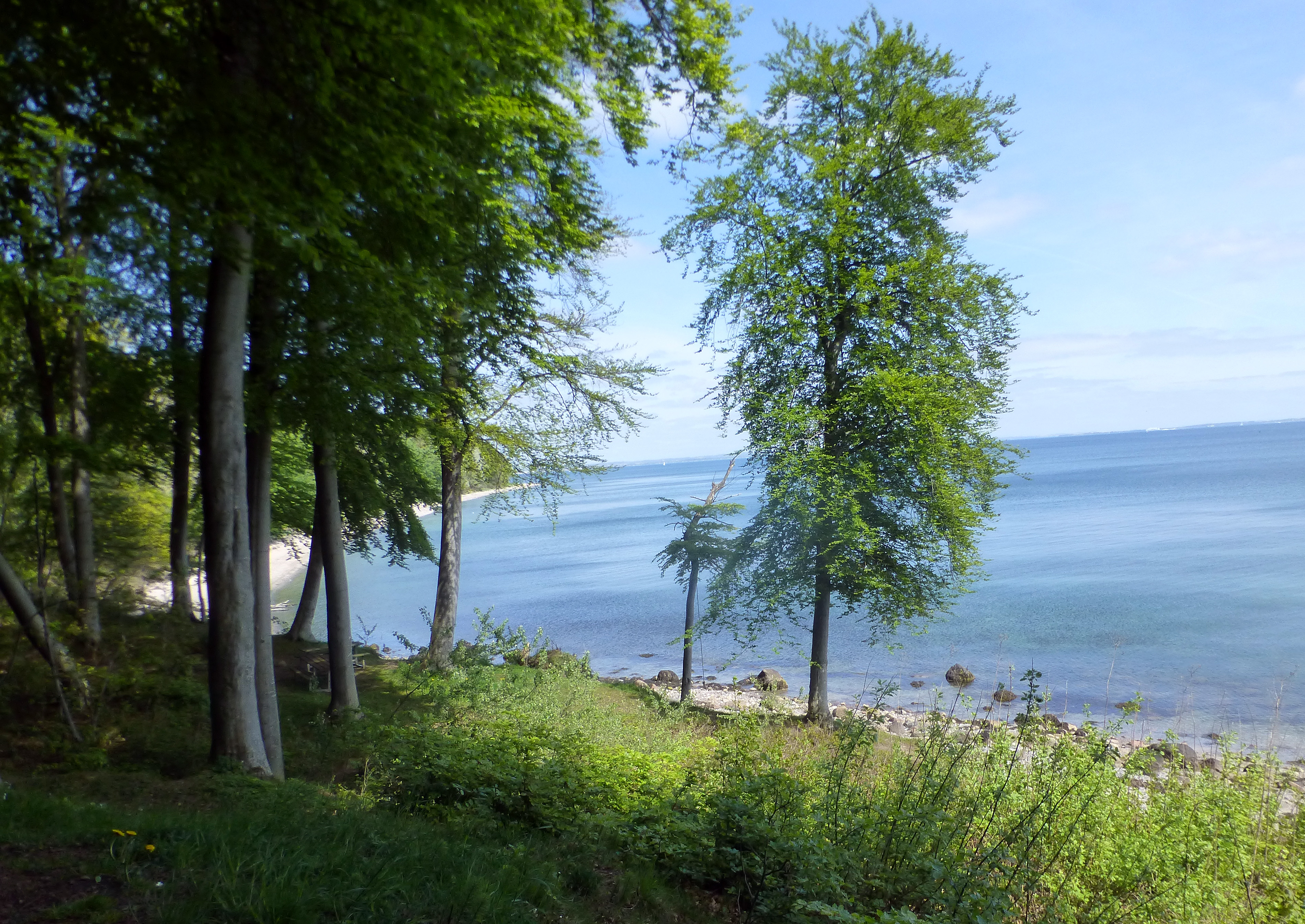 Udsigt til stranden